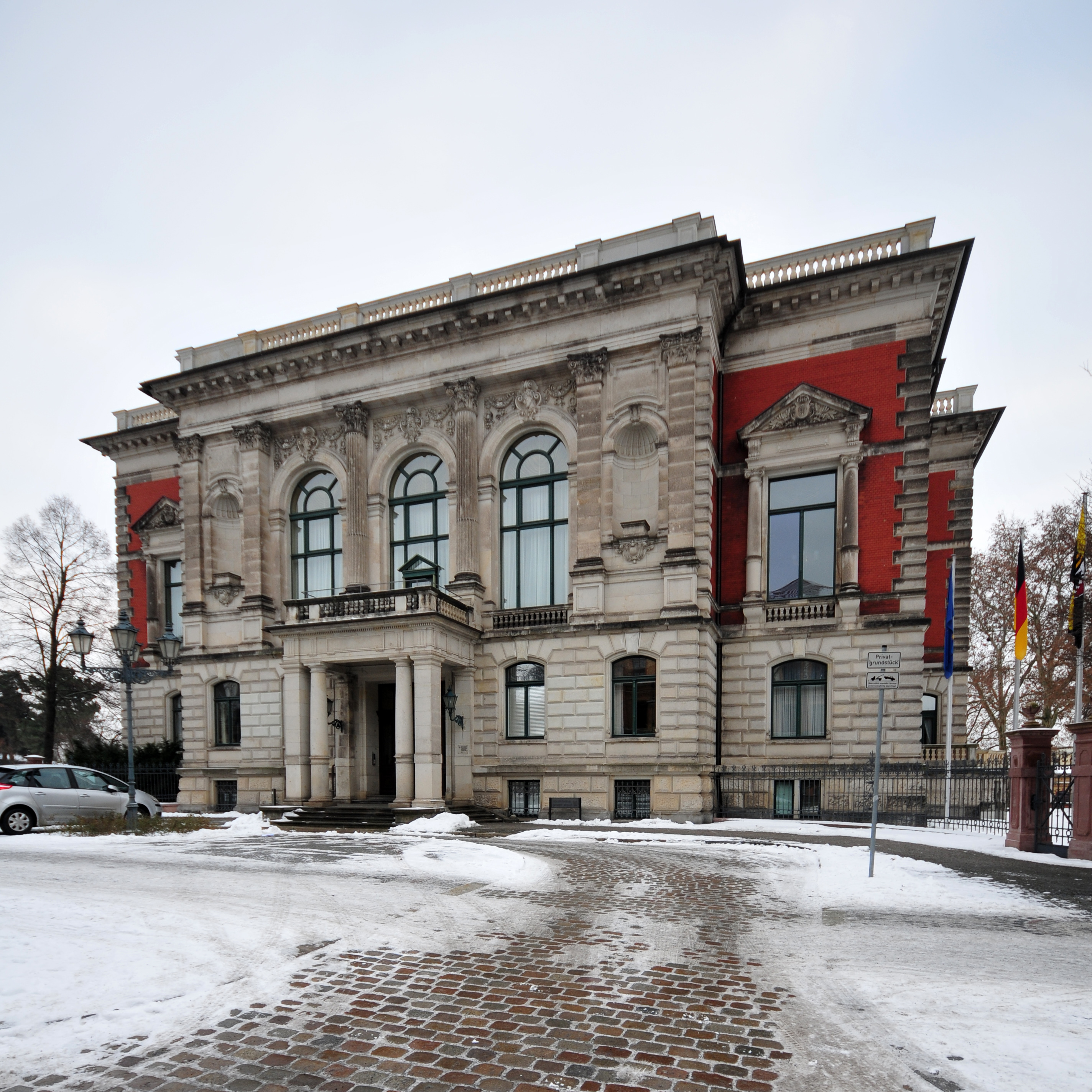 Staatskanzlei Sachsen-Anhalt im Palais am Fürstenwall Wikipedia im Landtag – Sachsen-Anhalt 13./14. Dezember 2012 in Magdeburg Dieses Foto wurde im Rahmen des Projektes „Wikipedia im Landtag“ erstellt. The making of this document was supported by the Community-Budget of Wikimedia Germany. The making of this document was supported by Wikimedia Austria.